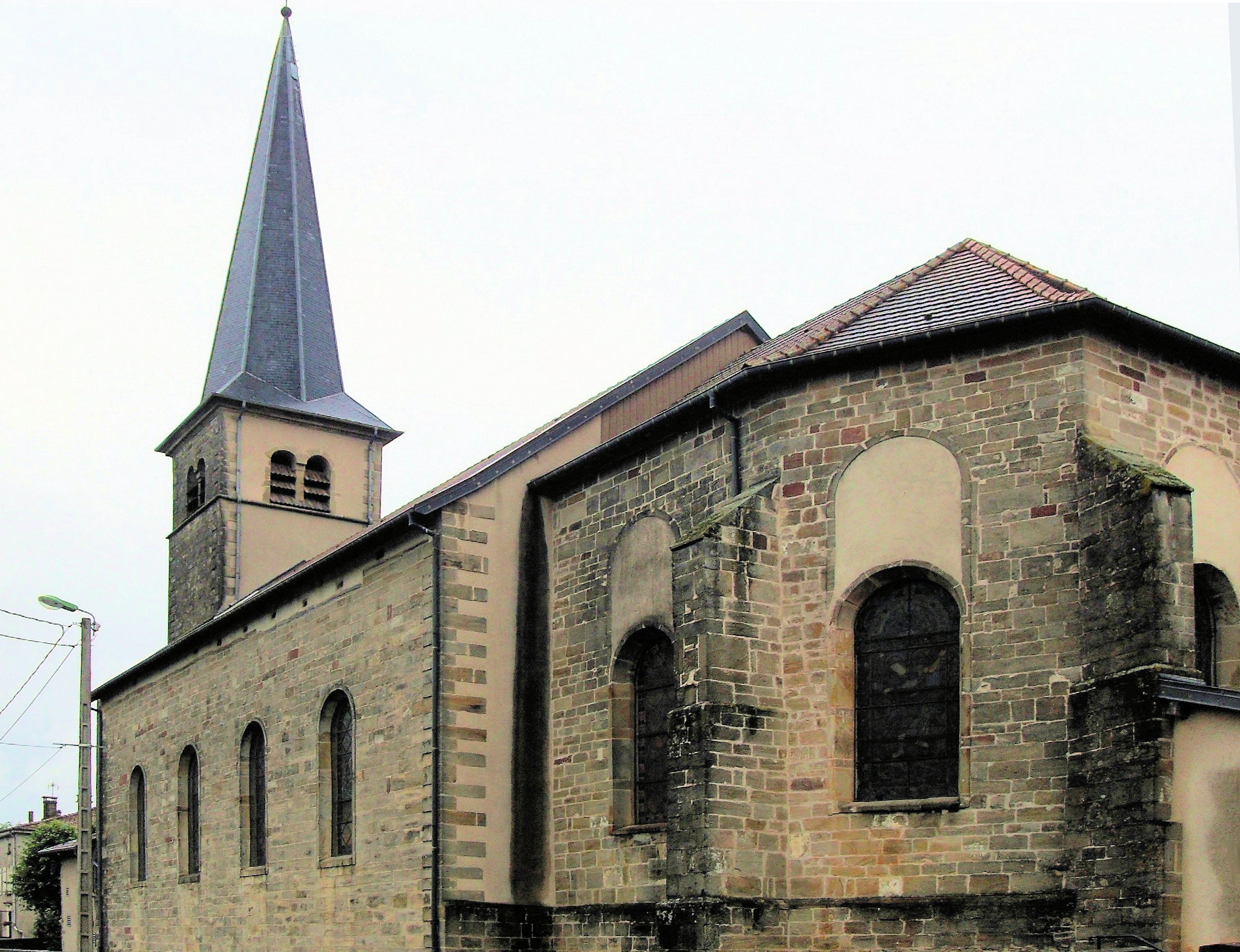 L'église Saint-Michel des Vallois